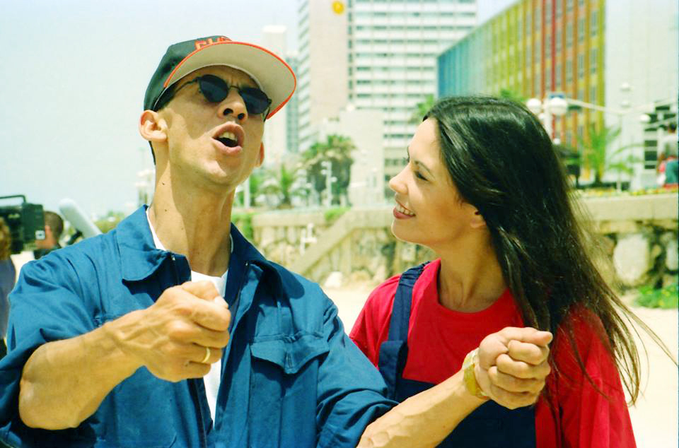 דידי הררי ומיכל זוארץ כשהגישו בערוץ 2 את התכנית "קיץ על החוף"